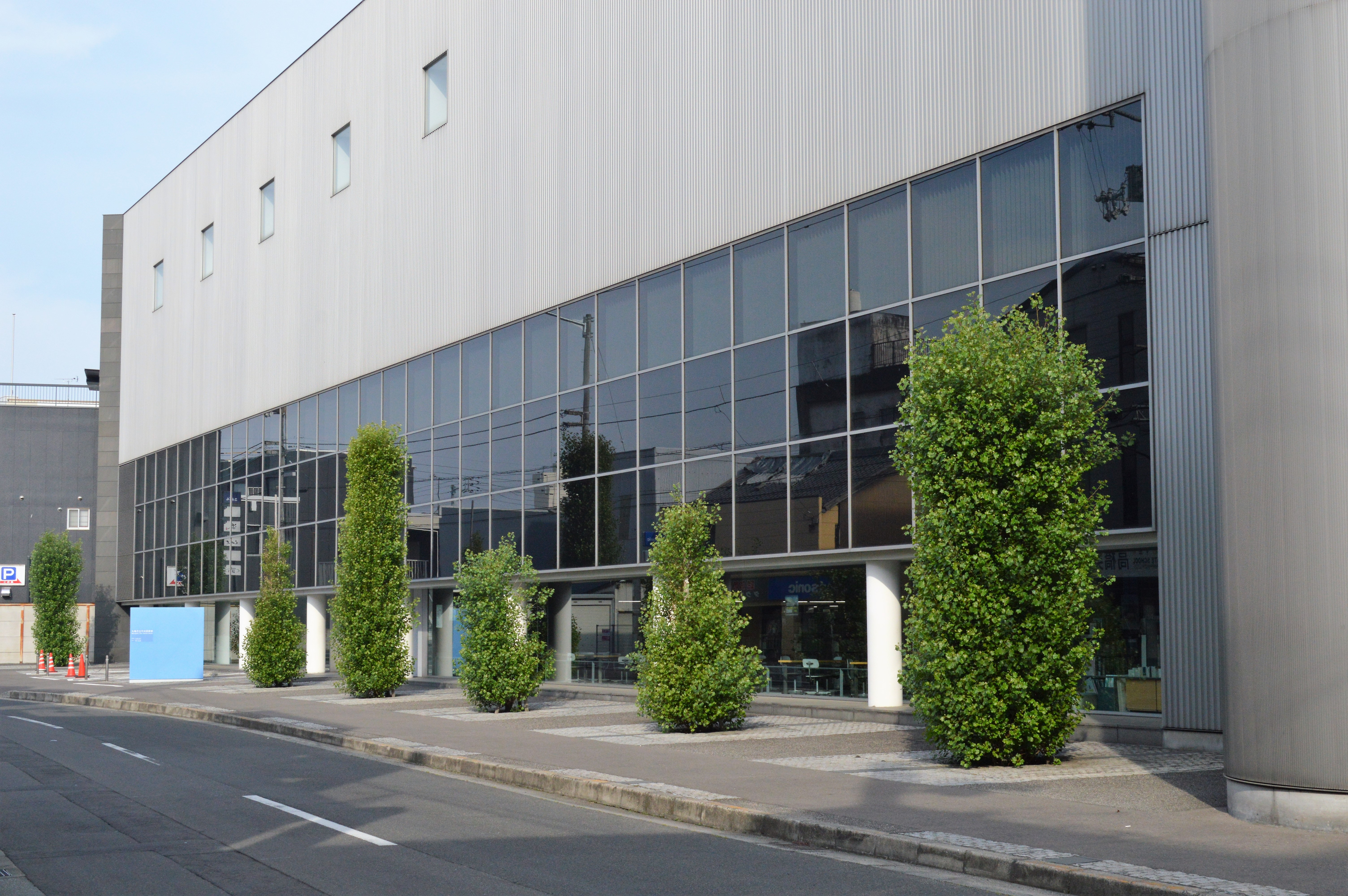 丸亀市立中央図書館。